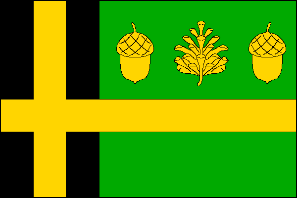 vlajka, Leština, okres Ústí nad Orlicí